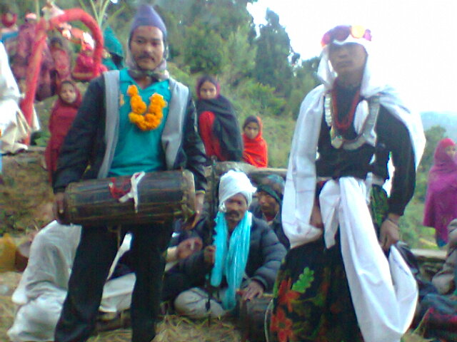 Maruni with madale